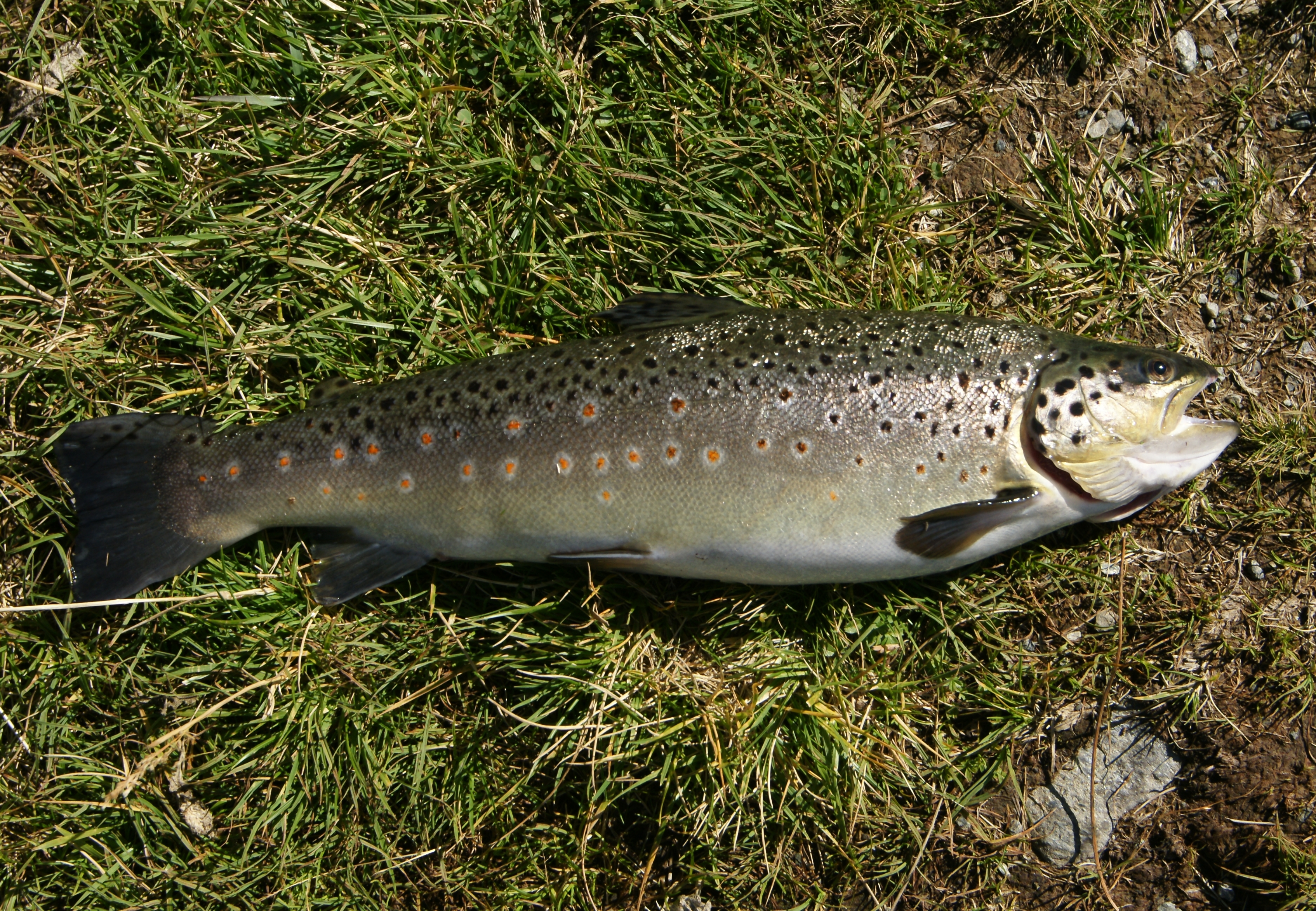 Eine Bachforelle aus dem Schwarzsee (Schruns) am Fusse des Hochjochs in Schruns.